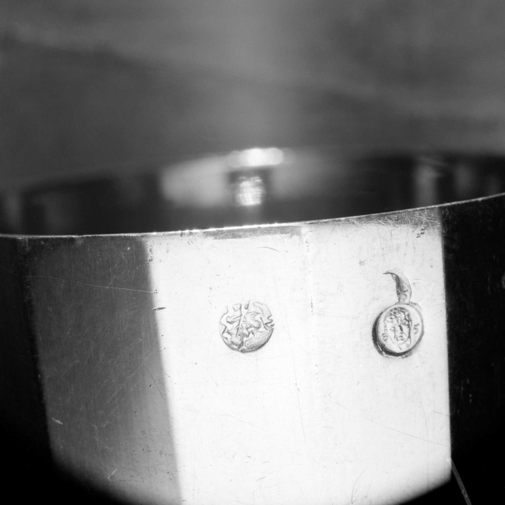 French, Paris; Liqueur cups; Metalwork-Silver